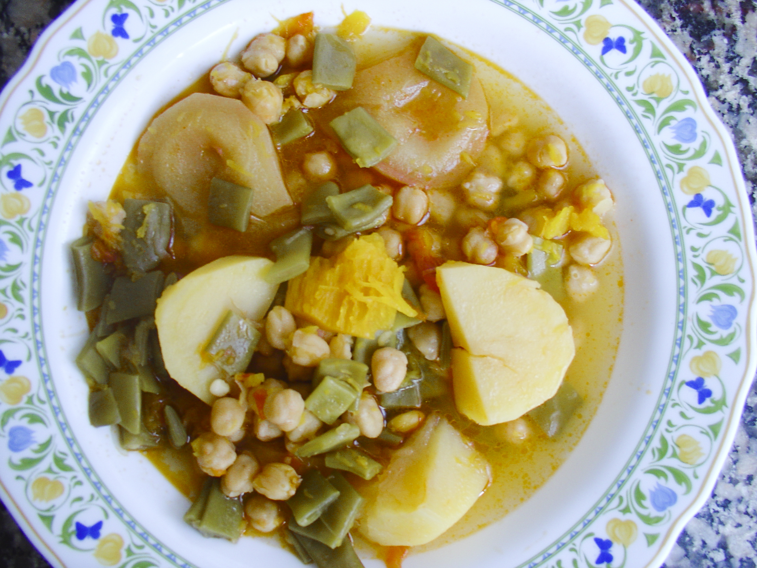 Olla gitana, an spanish potaje from Murcia